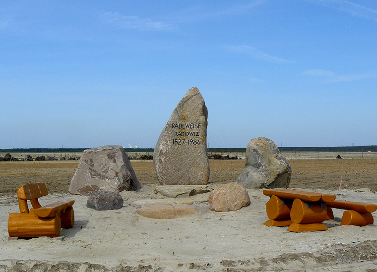 Gedenkstein in der Ortsmitte des devastierten Dorfes Radeweise bei Spremberg /Brandenburg/ Deutschland. Im Hintergrund ist das Kraftwerk Jänschwalde erkennbar.